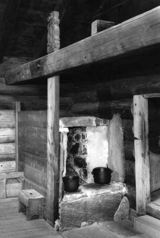 Røykovn i stue fra Nes i Varaldsøy, Hordaland. Nå på Norsk Folkemuseum.